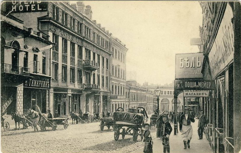 Софийская улица. Открытка.